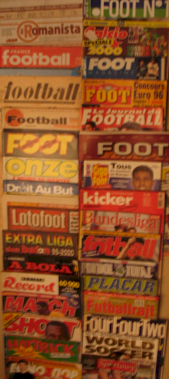 Magazines anciens ou actuels traitant de football. Old and actual football (soccer) magazines. les logos d'entêtes des magazines sont la propriété des magazines en question.